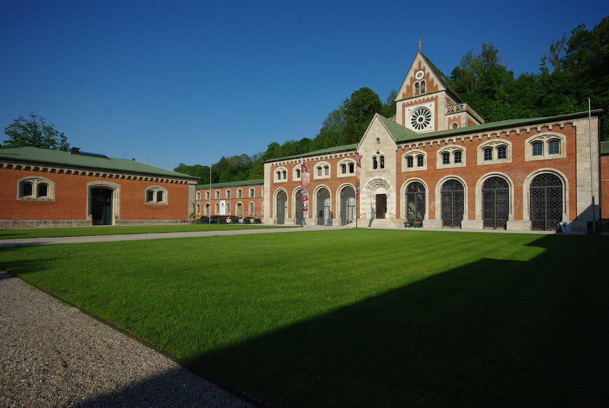 Alte SalineThis is a photograph of an architectural monument.